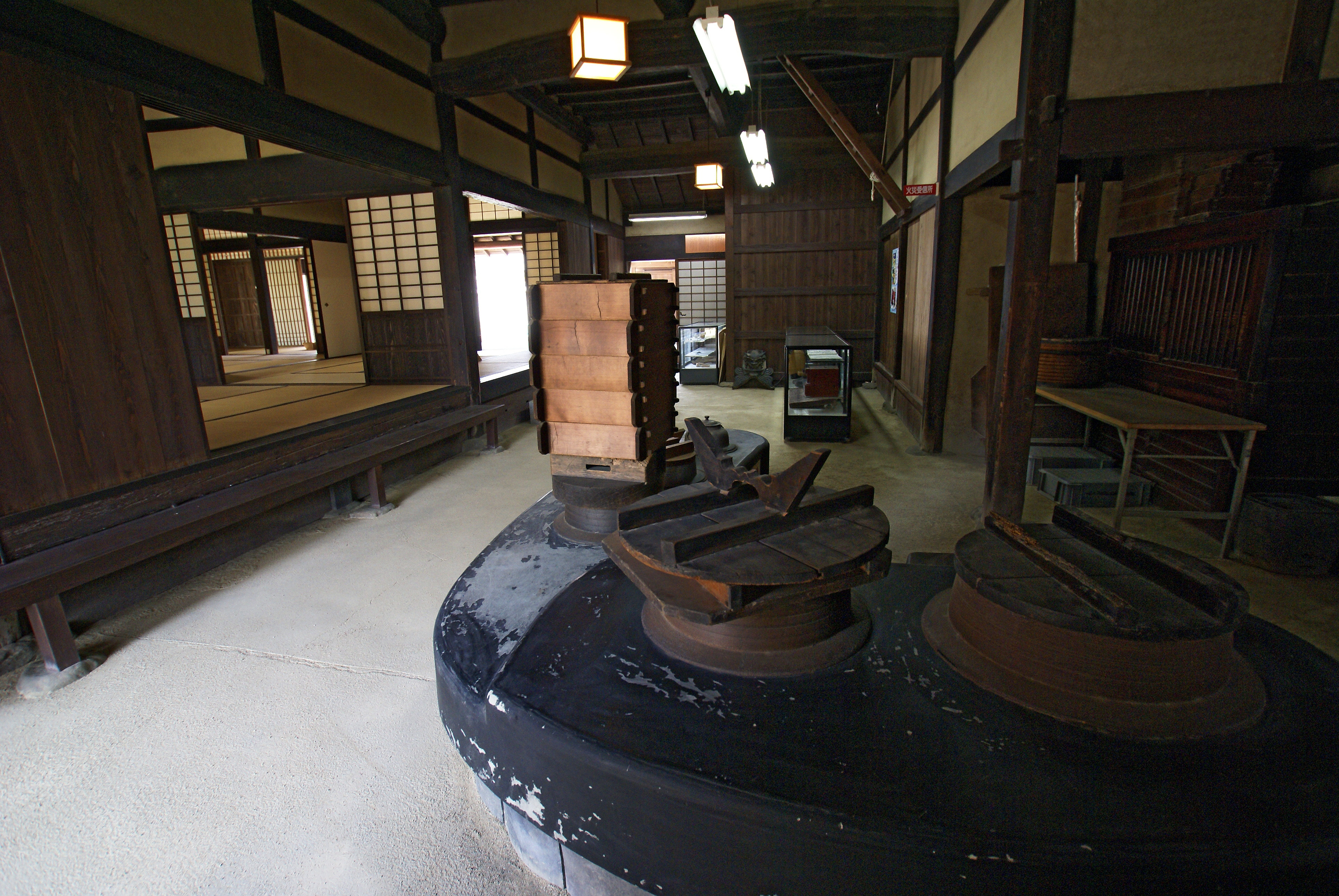 Old Nate-juku Honjin in Kinokawa, Wakayama prefecture, Japan